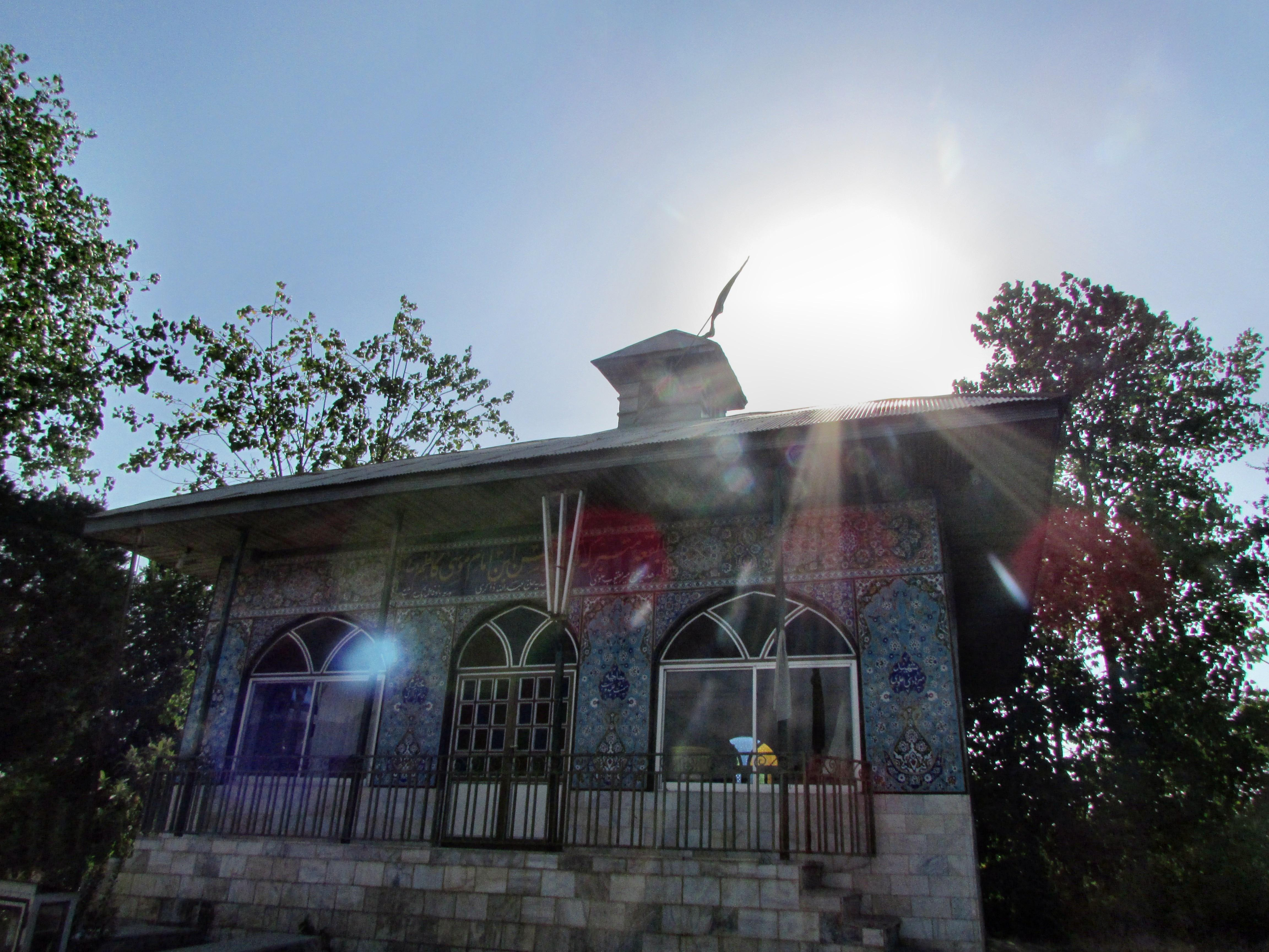 امامزاده آقا سید حسن در میان محله گلرودبار